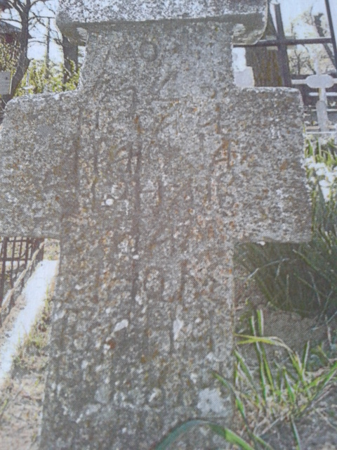 Crucea eteristilor